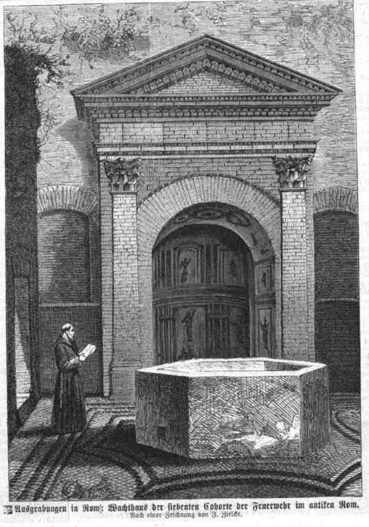 Ansicht des Wachthauses der VII. Kohorte der römischen Feuerwehr, bei Ausgrabungen wiederentdeckt.